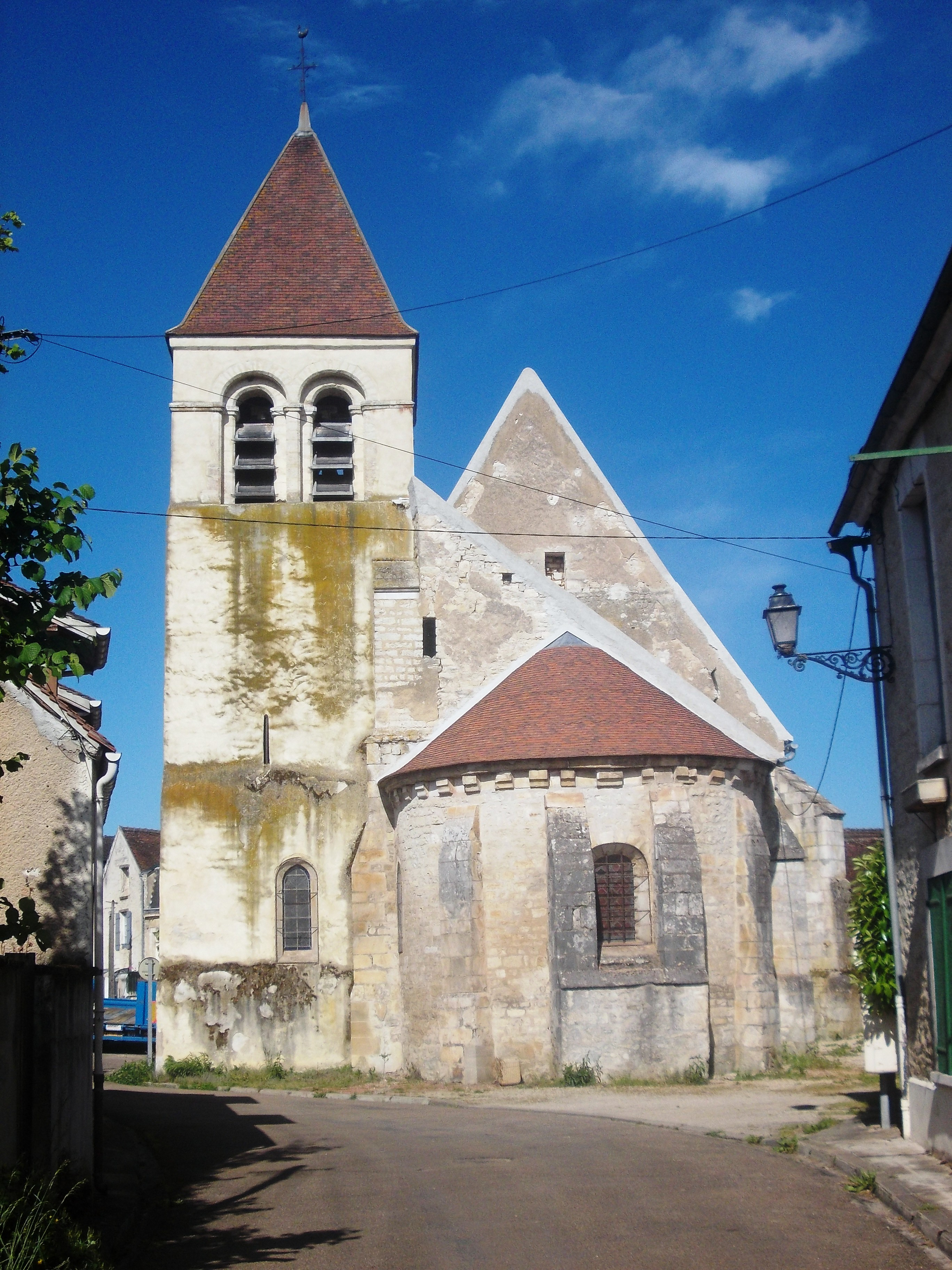 L'église Saint Nizier (XIème-XVIIIème s.) - le chevet